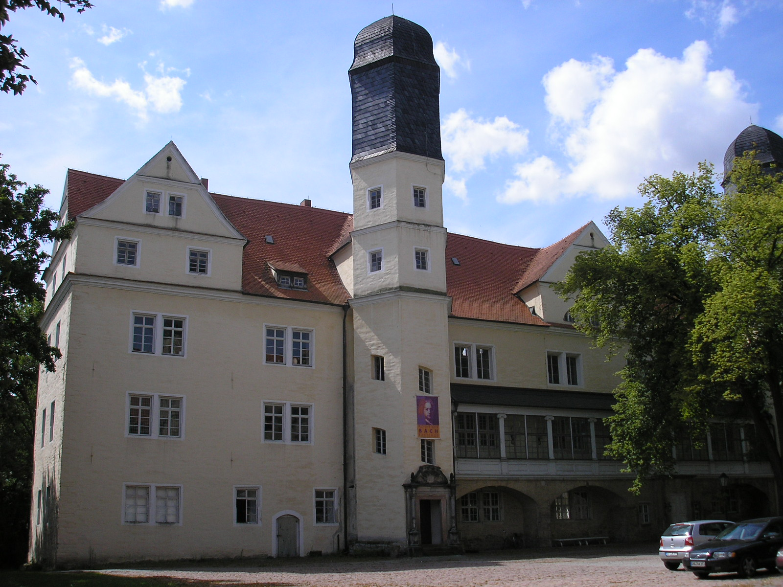 Teile des Residenzschlosses in Köthen (Anhalt).